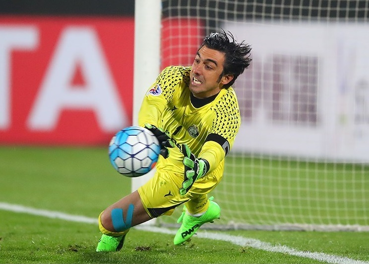 مهدی رحمتی در ضربات پنالتی مقابل السد قطر